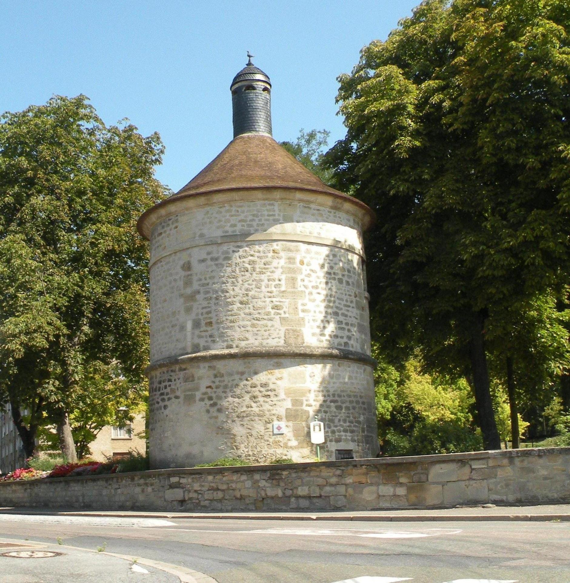 colombier de la seconde moitié du XVII siècle de Saint-Ouen-l'Aumône